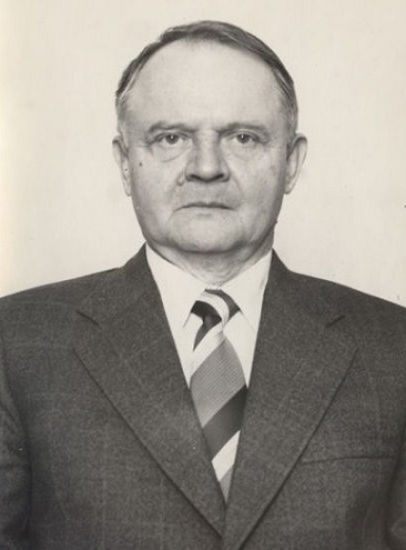 Юрий Андреевич Жданов (1919—2006) — советский и российский учёный, химик, ректор Ростовского государственного университета.